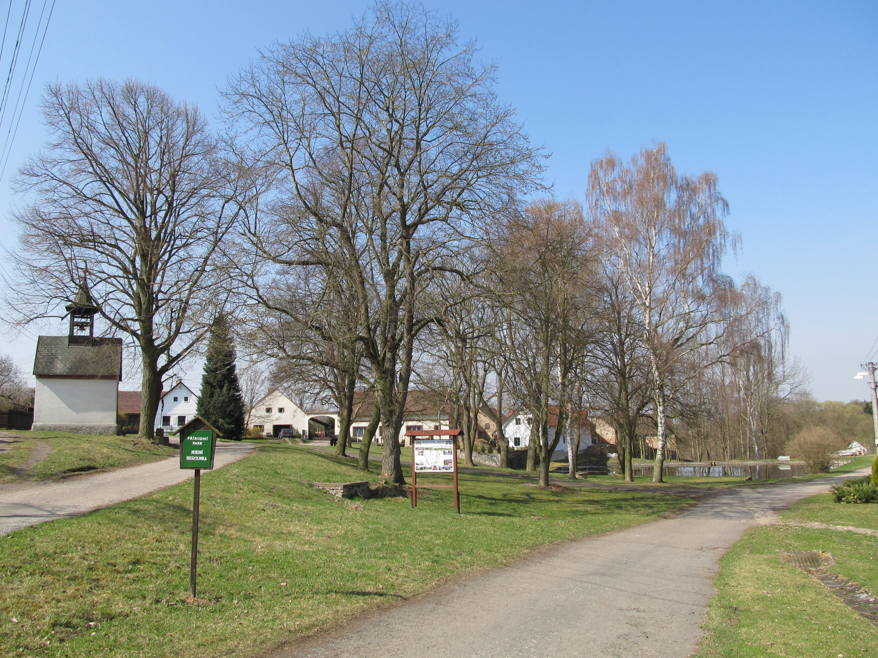 Prašný Újezd - náves